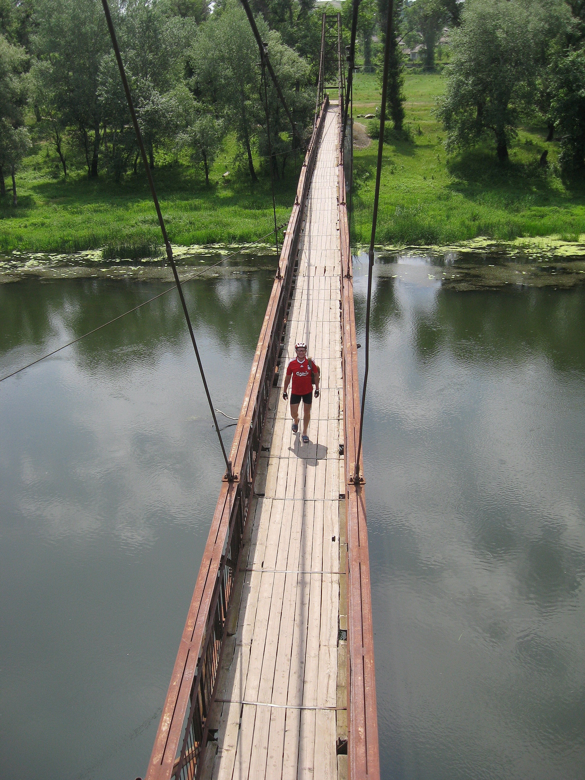 Міст через Сівеський Дінець біля Старої Краснянки, Луганська область